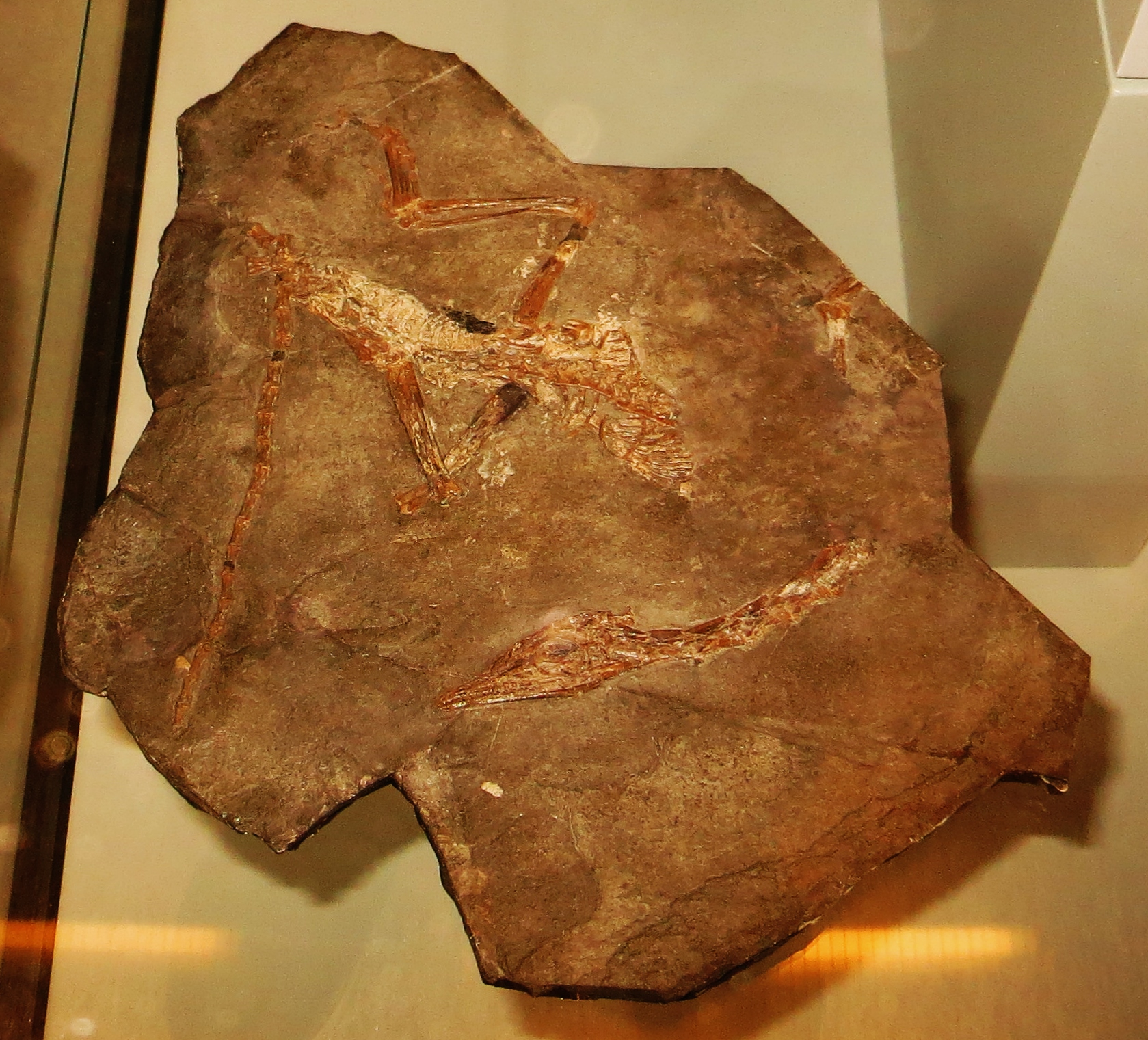 Fossil - Took the picture at Museum of Natural History Zurich